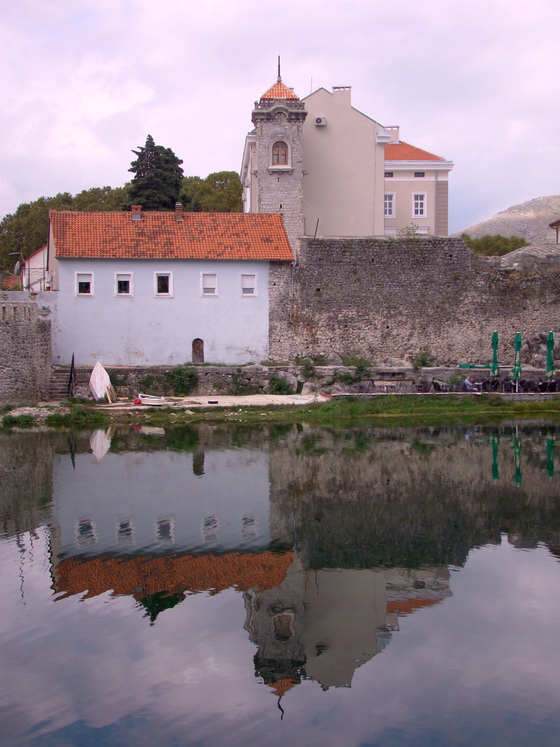 Српски (ћирилица): Требиње – просторна културно-историјска цјелина This image was uploaded as part of Trace of Soul 2016.